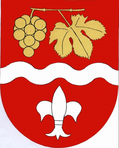 znak, Podmolí, okres Znojmo